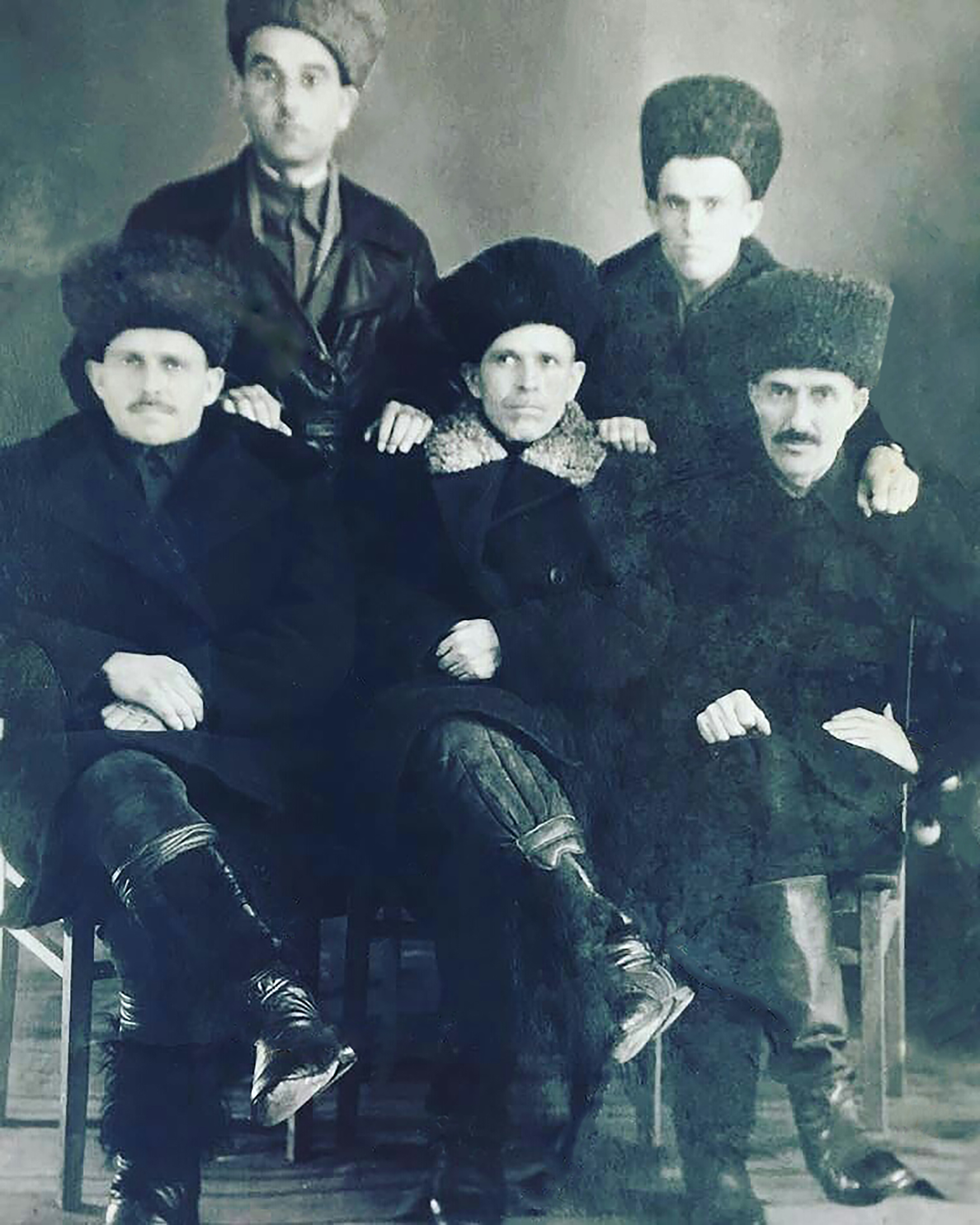 Представители общества Мулкъой